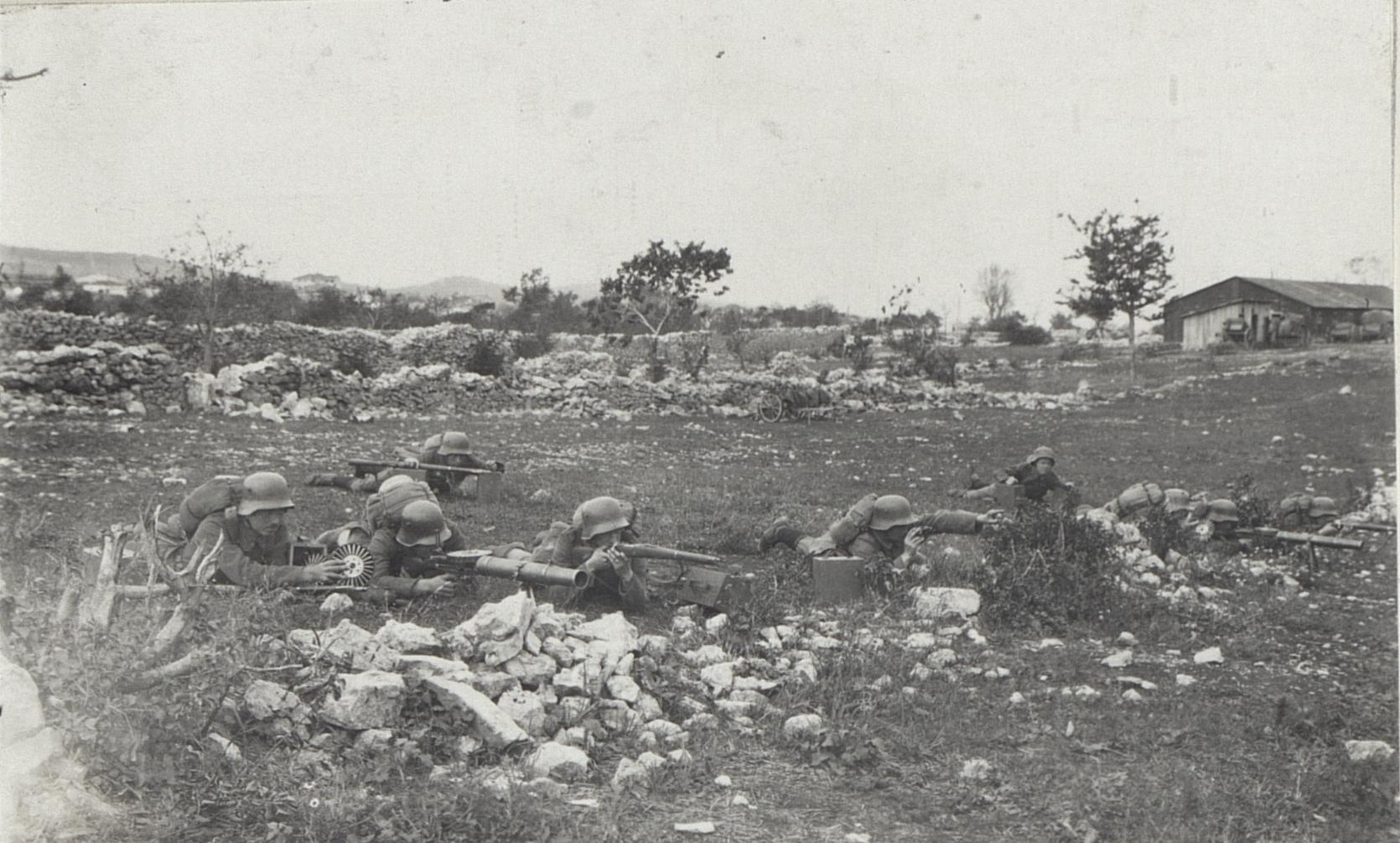 Deutsche Lewis . a.d. Isonzofront